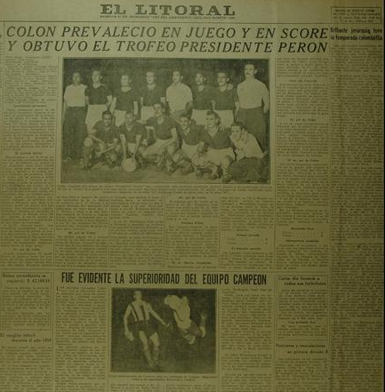 Colon campeon